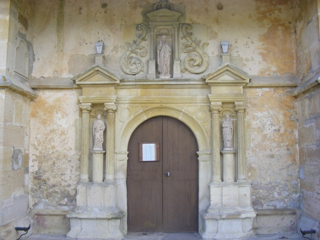 Portail nord - XVIème siècle.